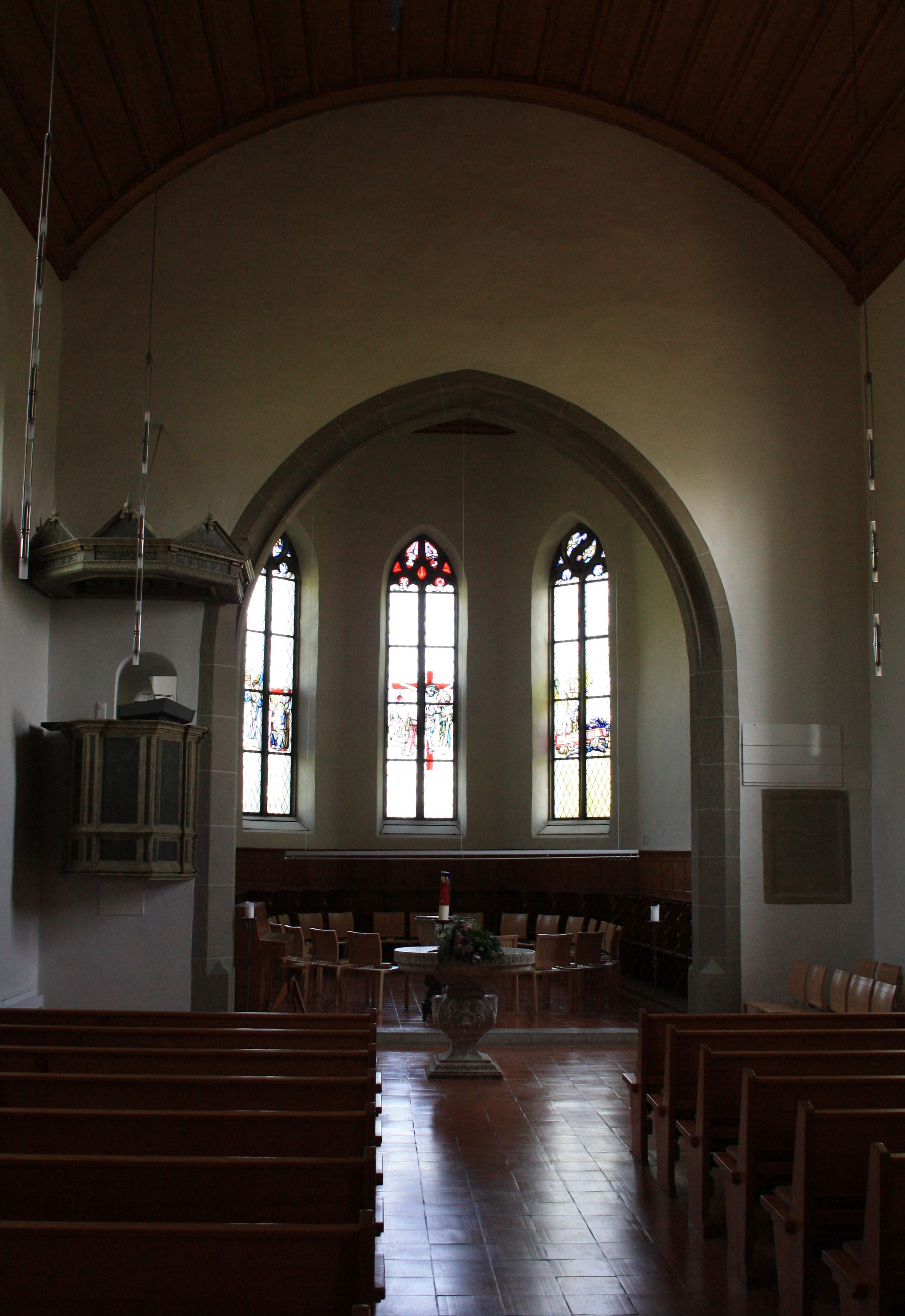 Kirchenschiff der ref. Kirche